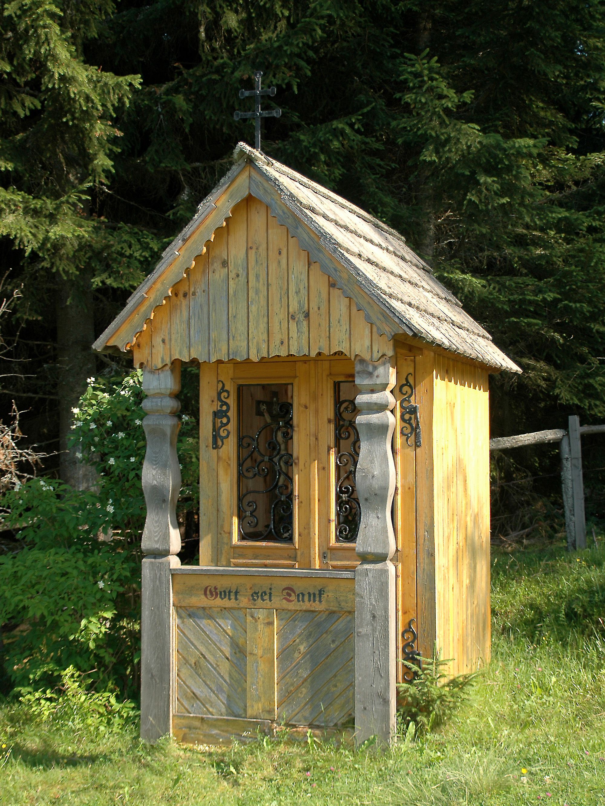 Großbauerkreuz Besitzer: Familie Pletz vlg. Großbauer in Mönchegg 11 Gemäß Inschrift wurde dieses Kreuz 1891 errichtet, laut mündlicher Überlieferung deshalb, weil es dort zu einem Todesfall infolge Blitzschlages kam. Anderseits ist im Kreuz ein Gedenkbild angebracht, das an den Erfrierungstod eines Familienmitgliedes der Altbäuerin erinnert. Im Jahre 1991 wurde dieses Kreuz zuletzt renoviert